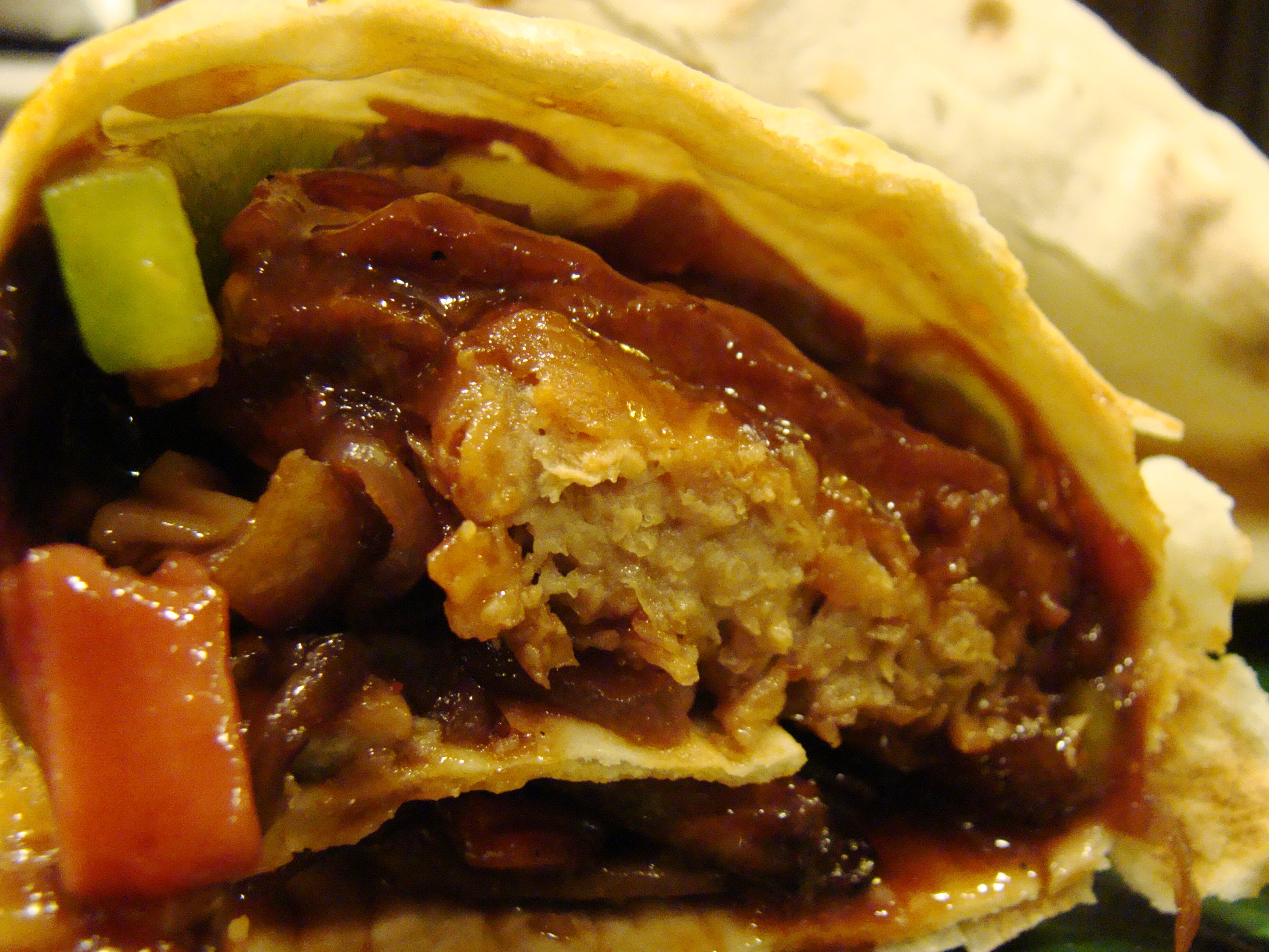 Vegan BarBeQue Seitan Lavish